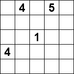 Egen teckning